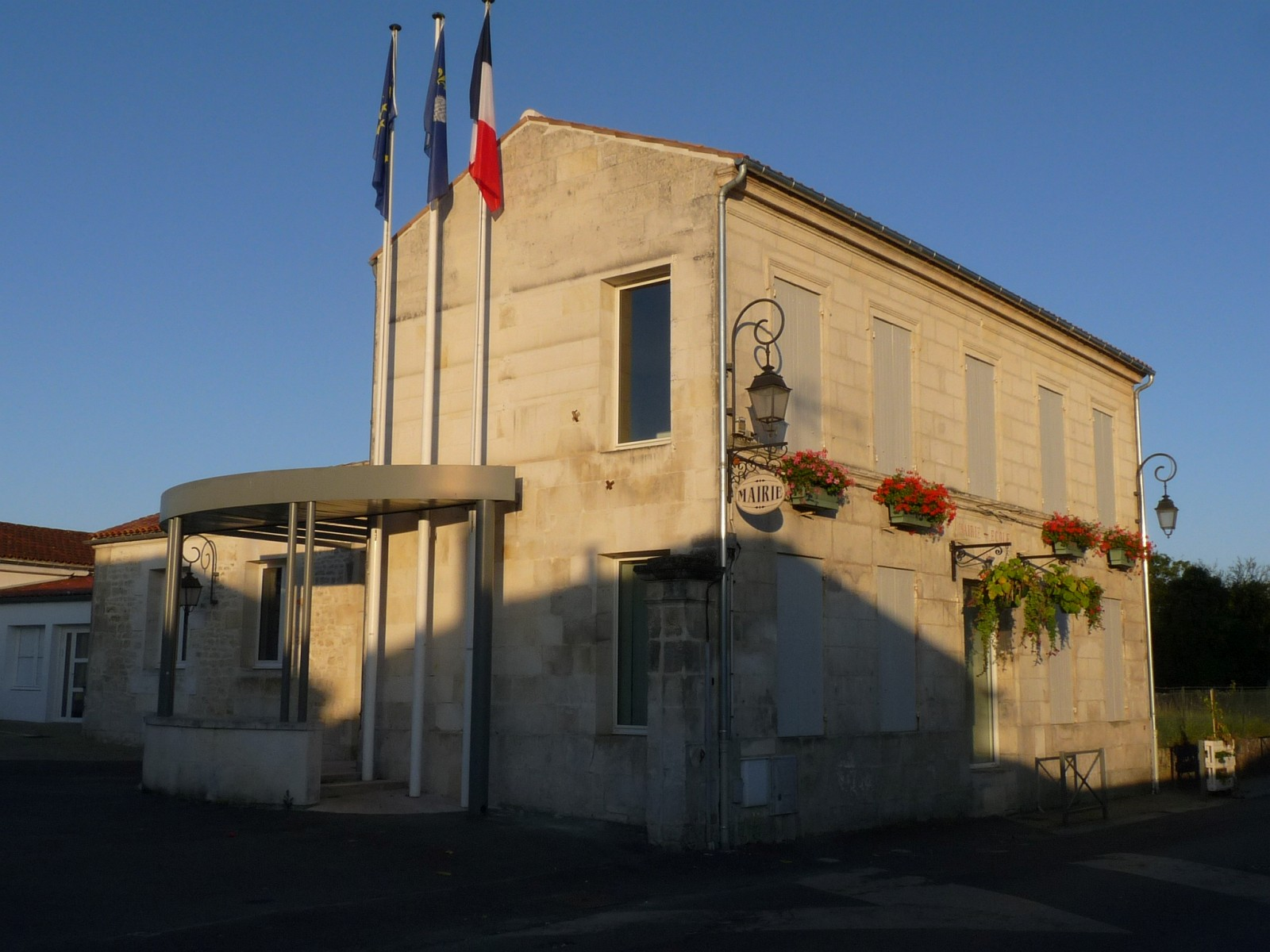 Mairie des Gonds, Charente-Maritime, France